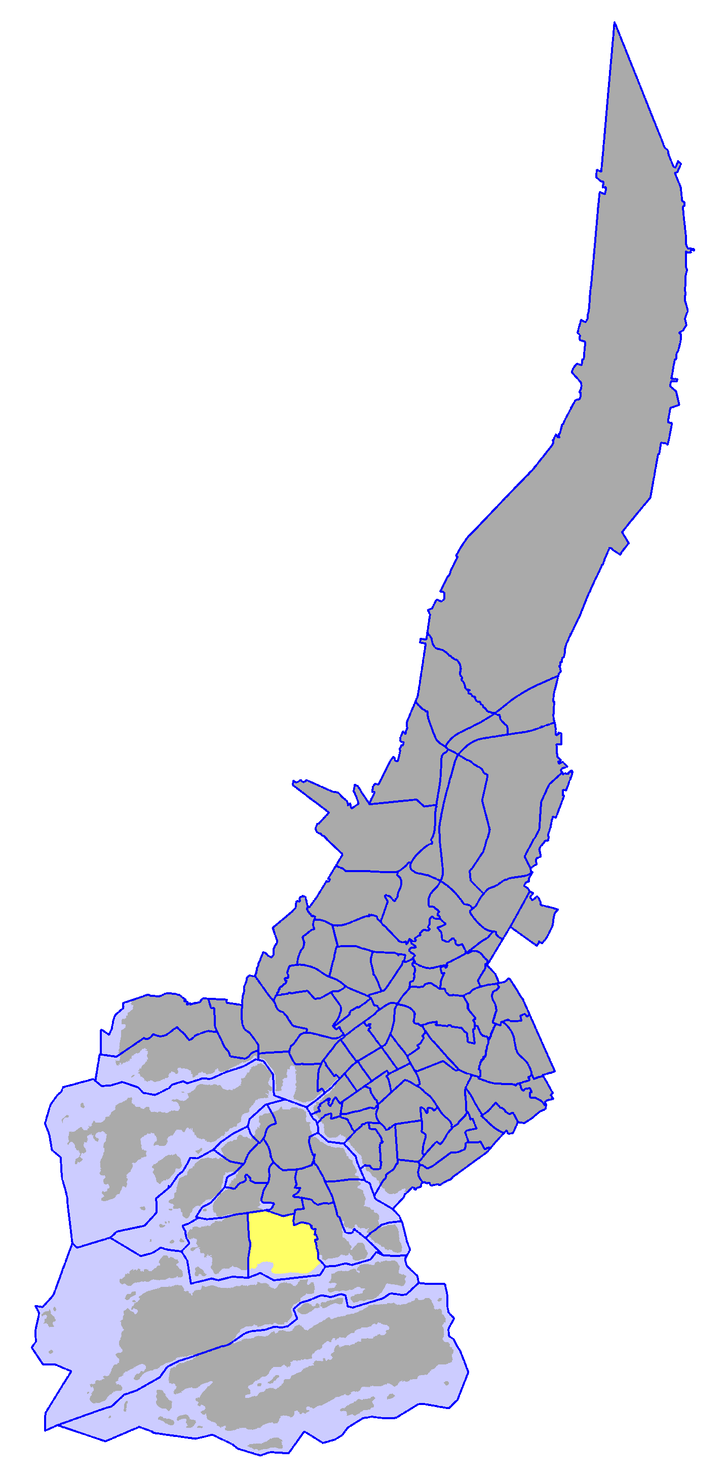 District of Haarla, in Turku